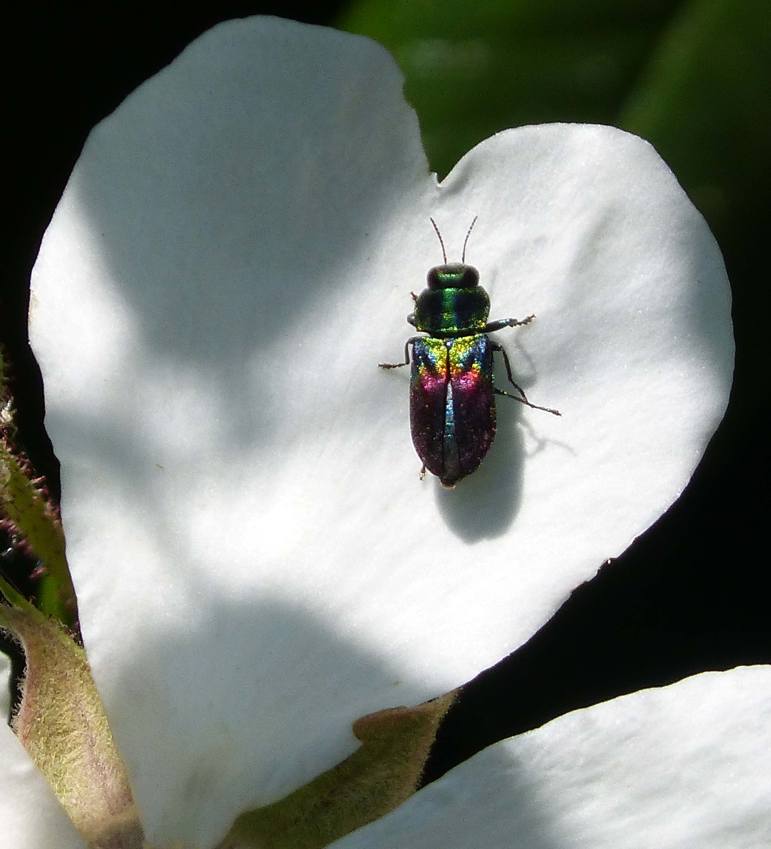 Alconocales N.P., Andalucia, Spain